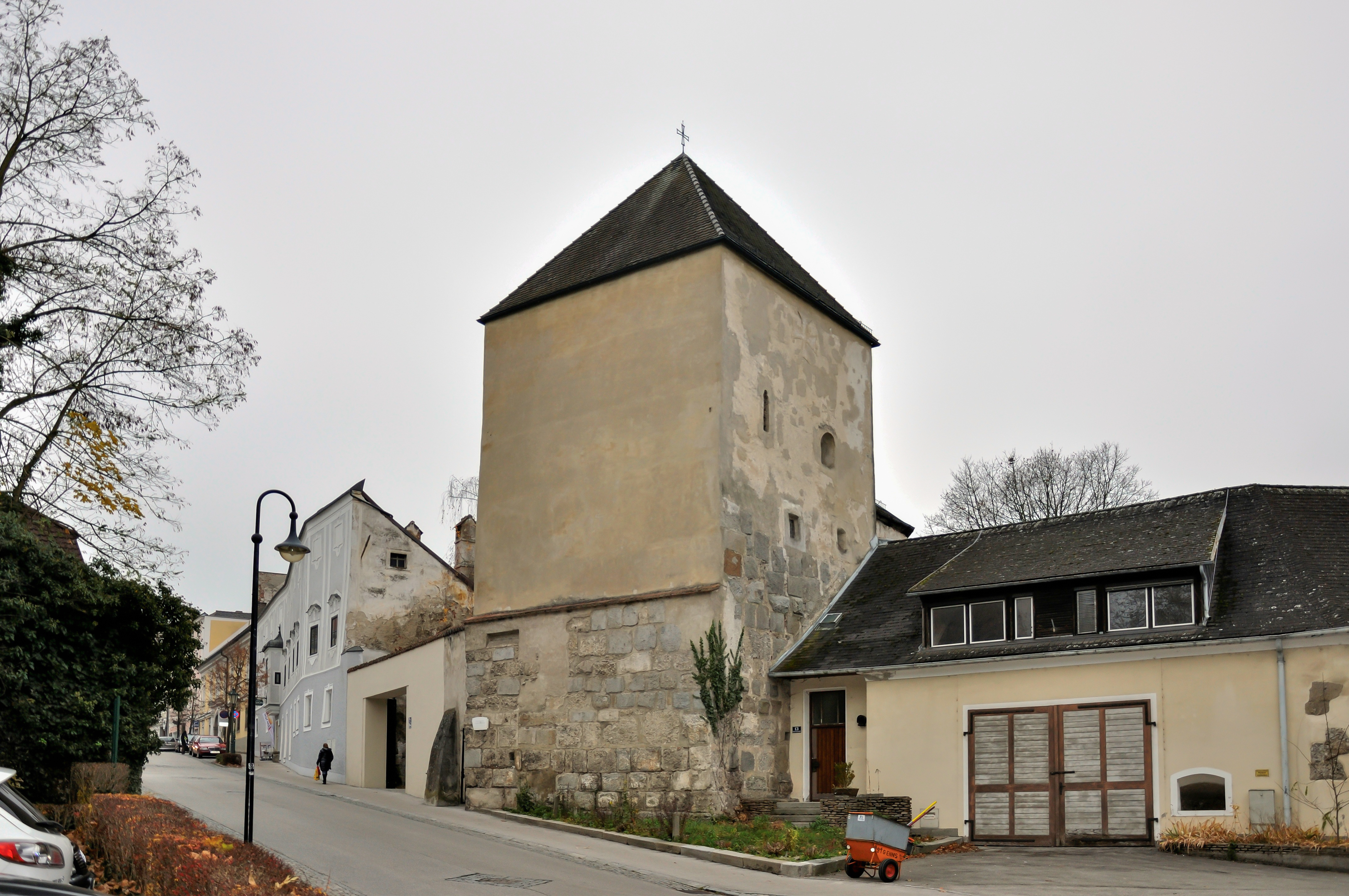 Frauenturm